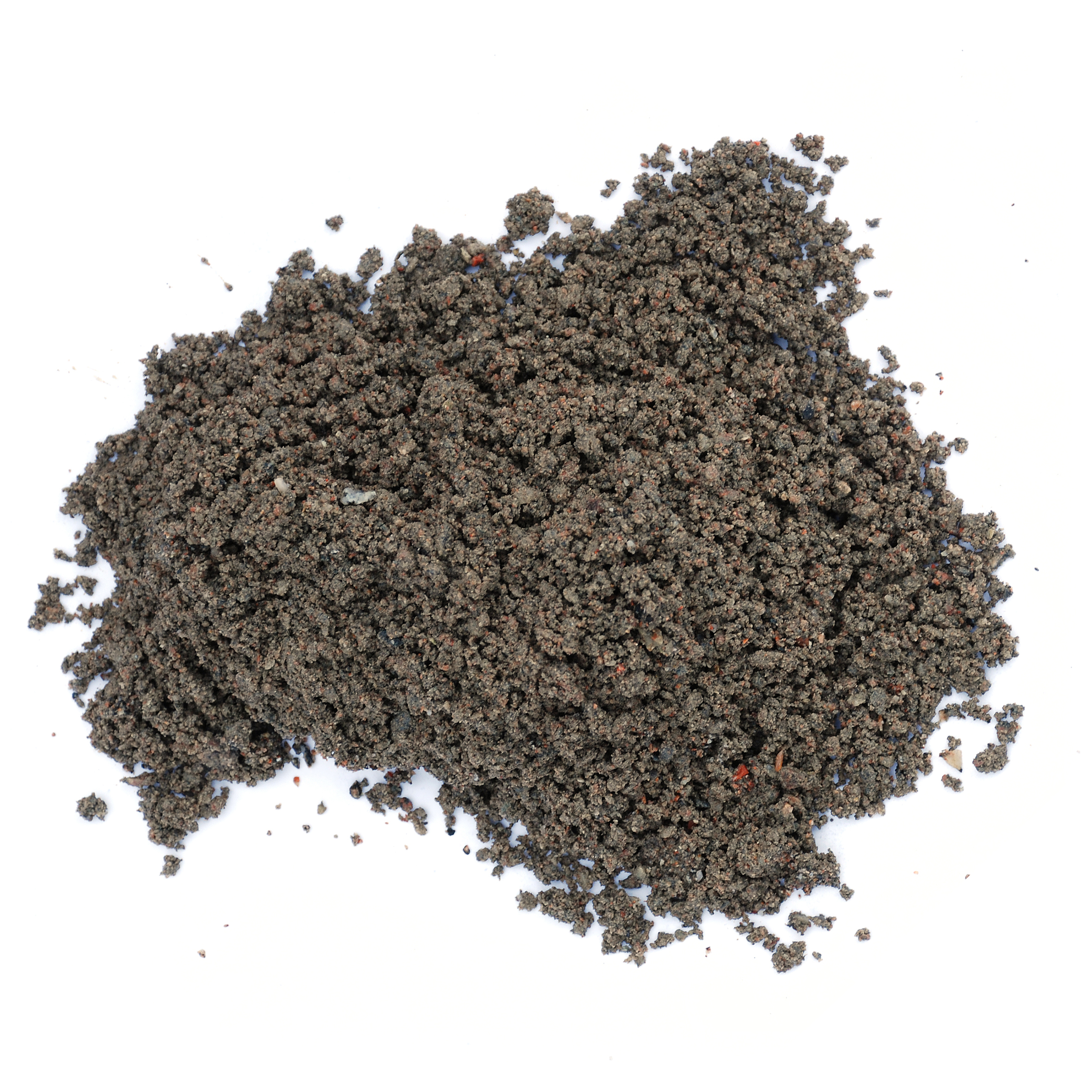 Stenmjöl, 800 kg, 0-4 - photo taken by Stenbolaget.se